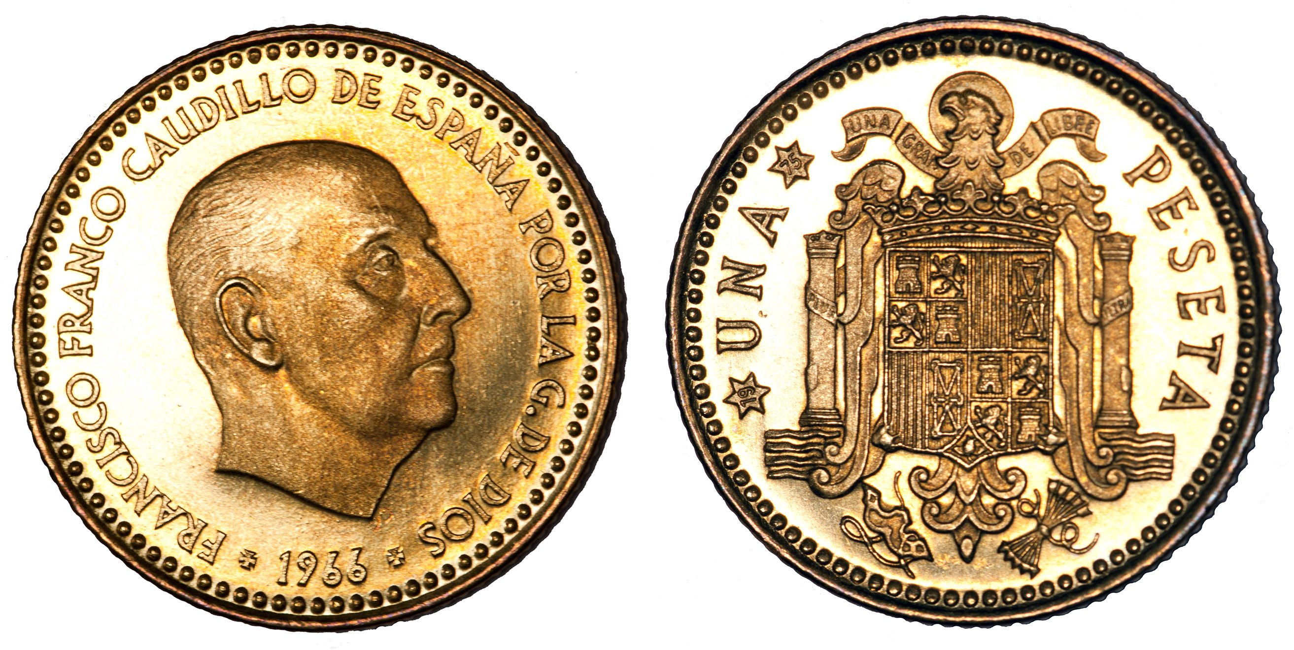 Una Peseta